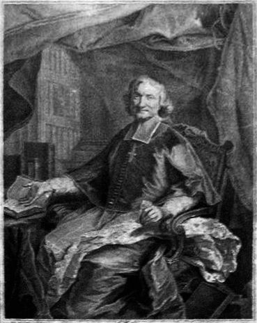 Gravure de Tournel, reprenant une peinture de Hyacinthe Rigaud (cet original est perdu)